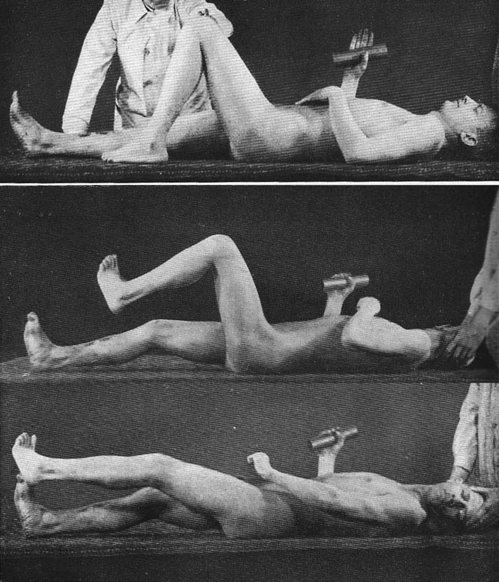 Die Abbildung zeigt einen linksseitig Gelähmten. Bei passiver Kopfdrehung nach rechts (mittleres Bild) kommt es zu Mitbewegungen auf der linken Körperhälfte, etwa in Form einer Arm- als auch Hüftbeugung. Bei passiver Kopfdrehung nach links (unteres Bild) treten andere Mitbewegungen der linken Körperhälfte auf (etwa Beinstreckung).